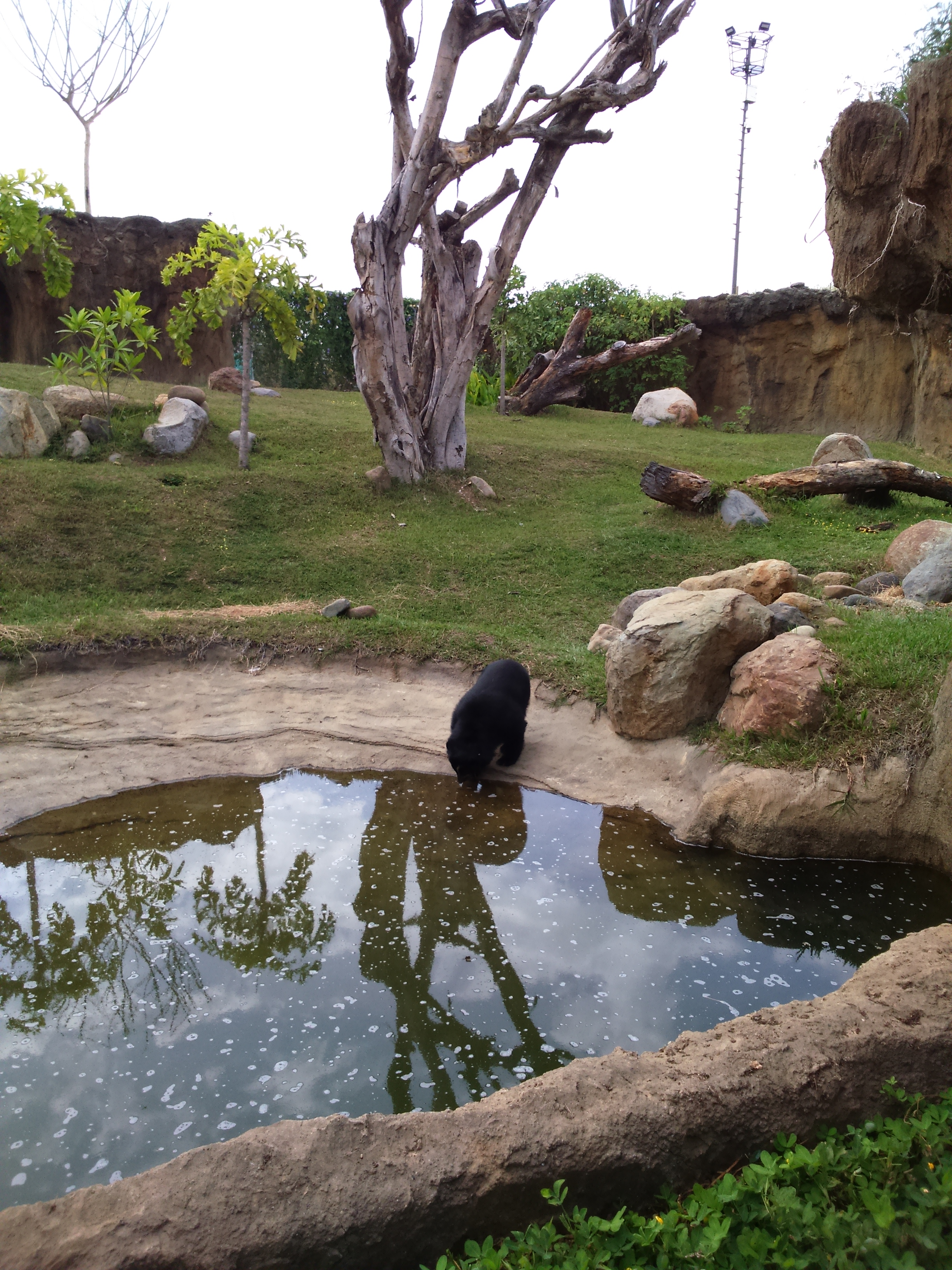 Hábitat del oso de anteojos en Bioparque Ukumarí